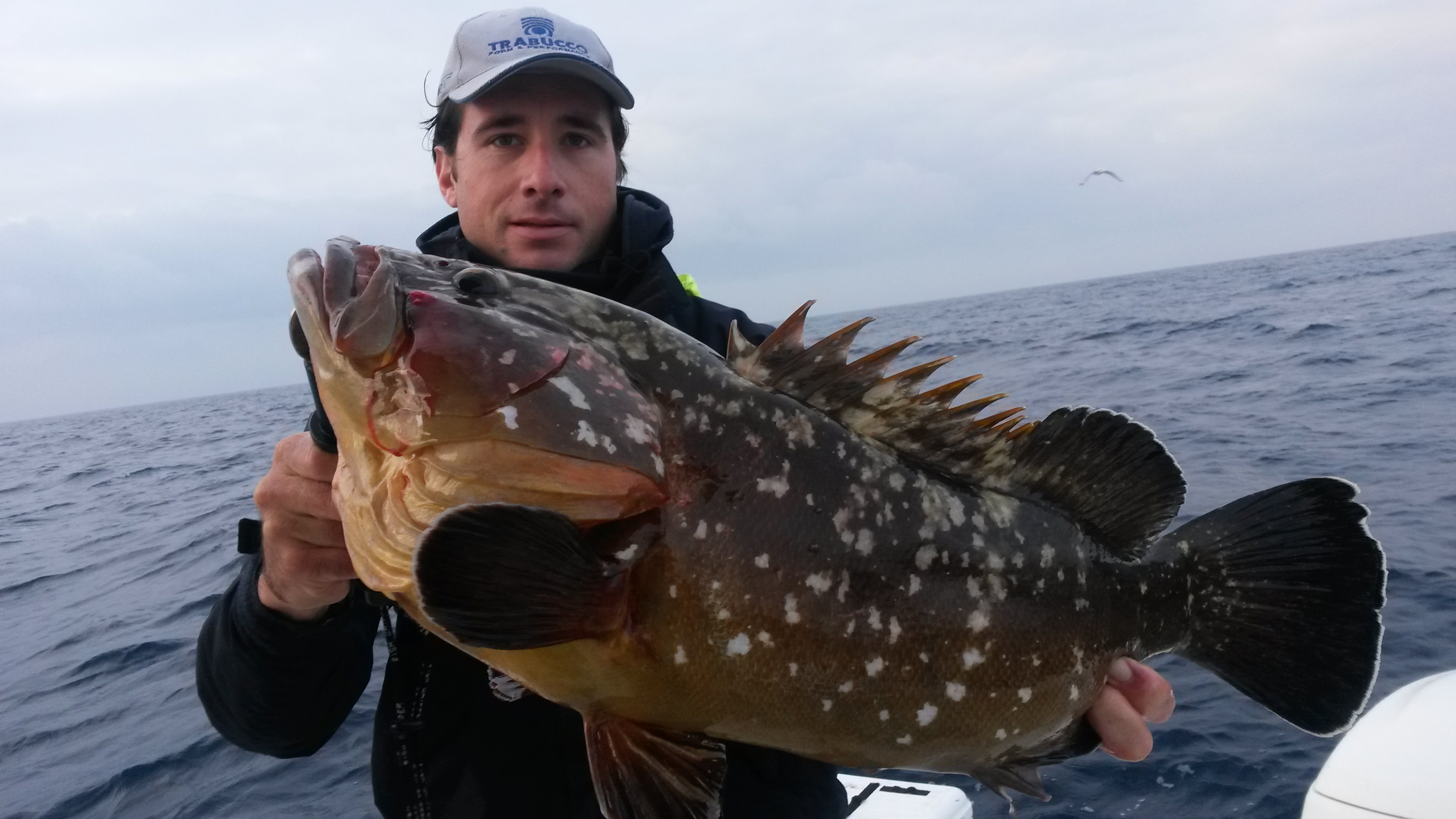 Scatto rubato durante le riprese del documentario sulla pesca sportiva intitolato cernie a bolentino